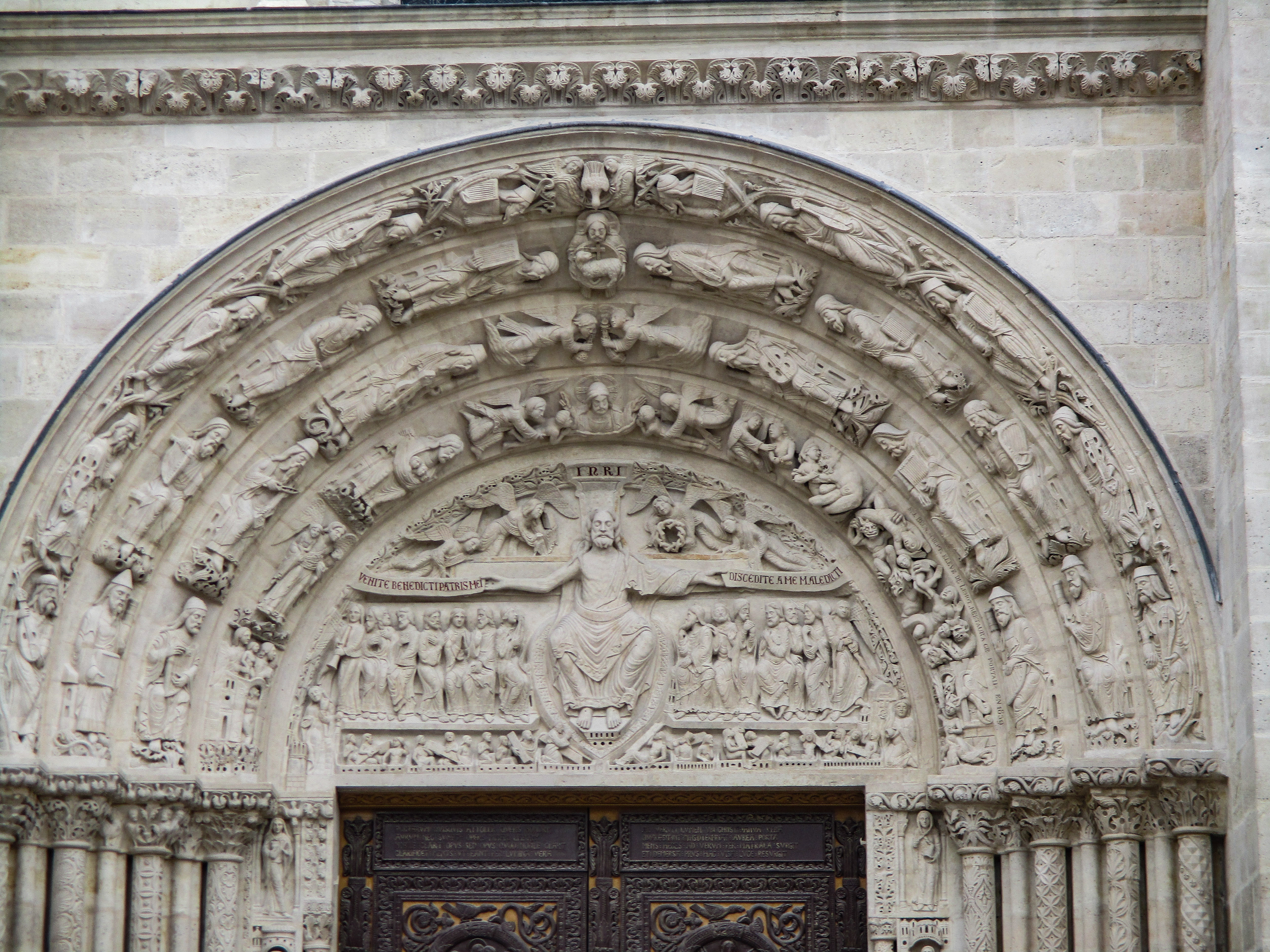 Tympan de la façade occidentale de la basilique Saint-Denis.